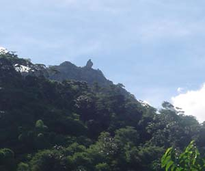 Licença